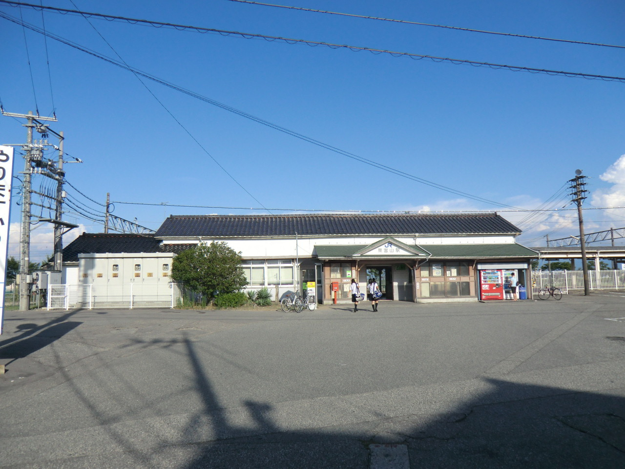 東富山駅